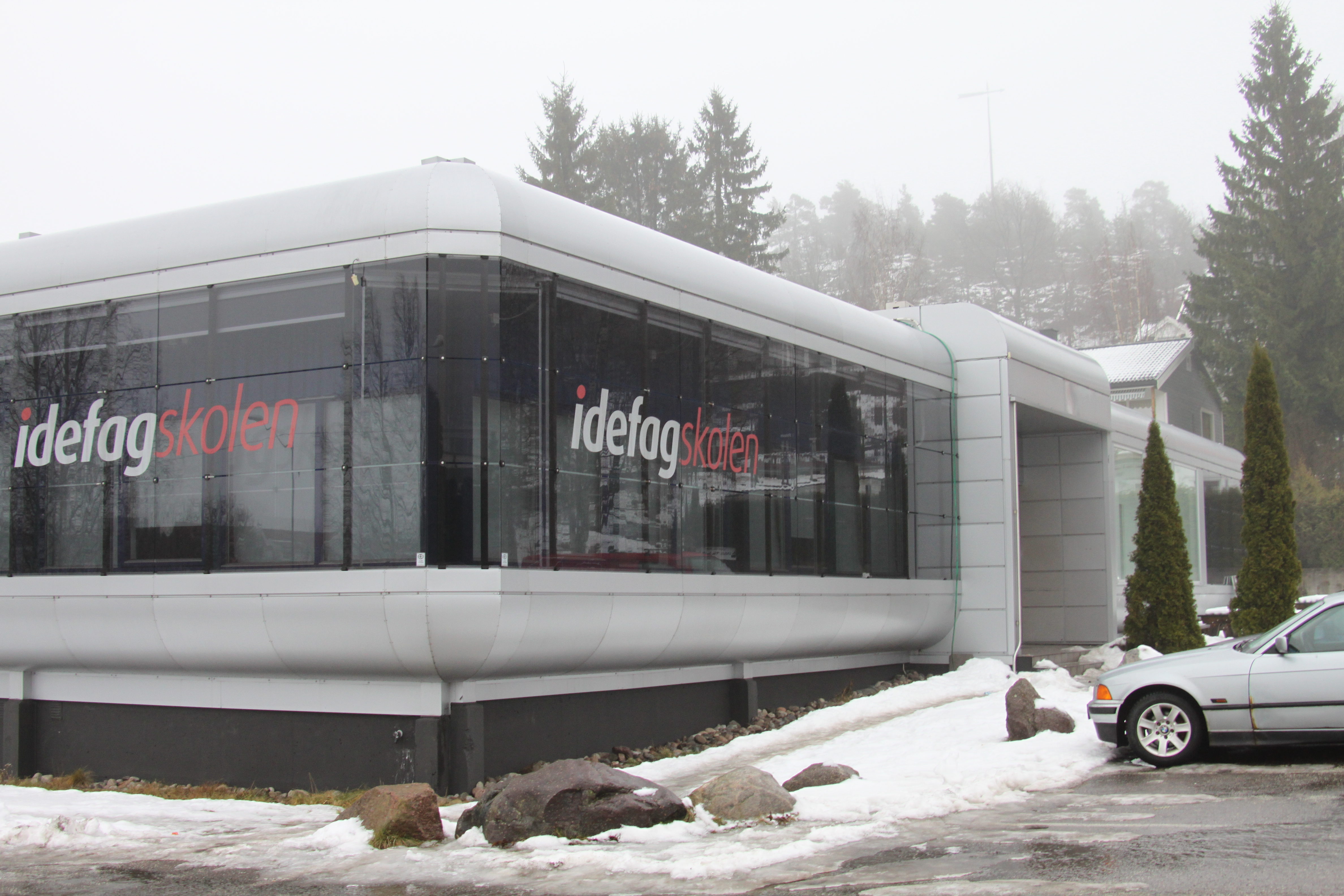 Idefagskolen i Tønsberg